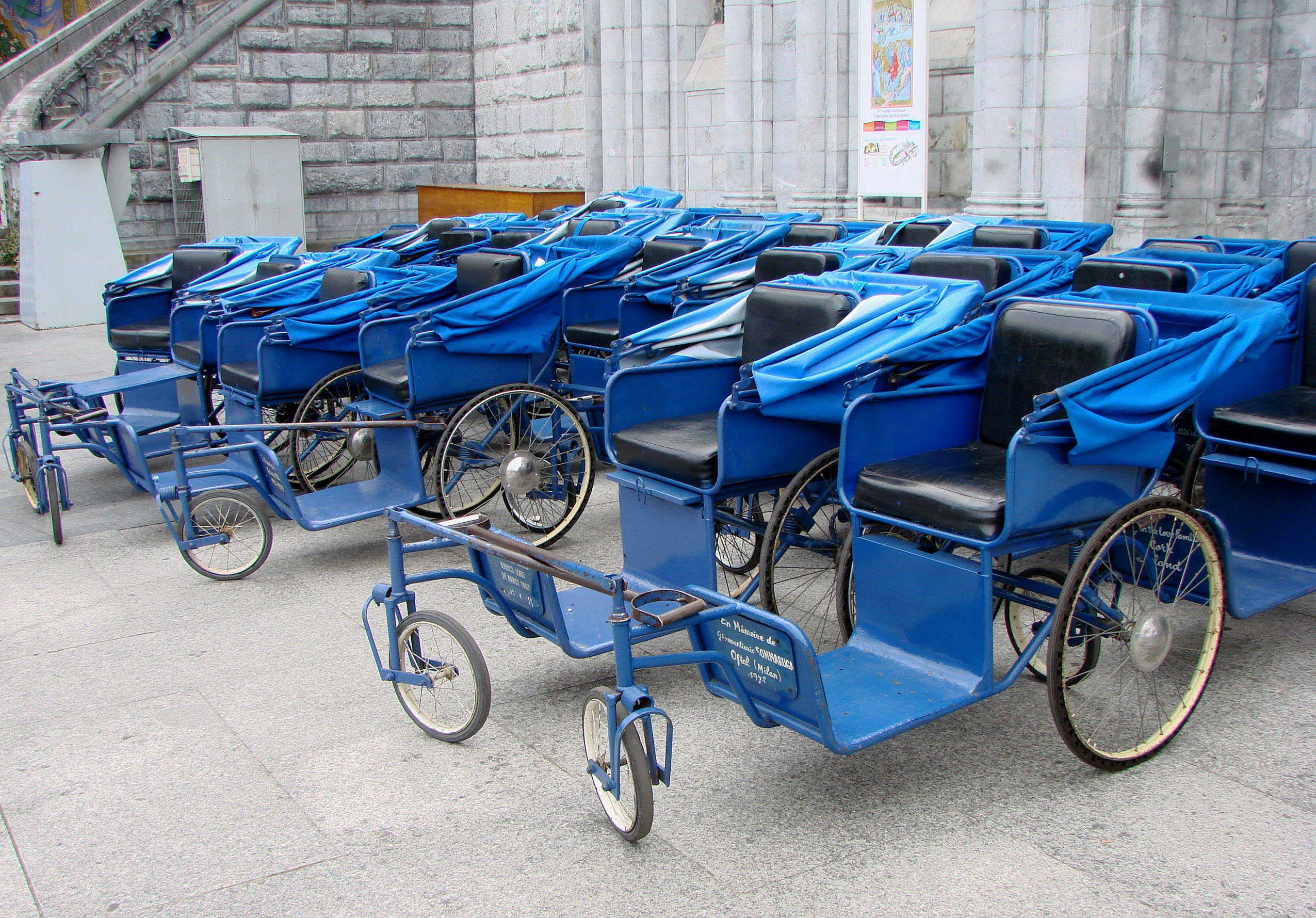 Les fauteuils roulants du sanctuaire devant la basilique.